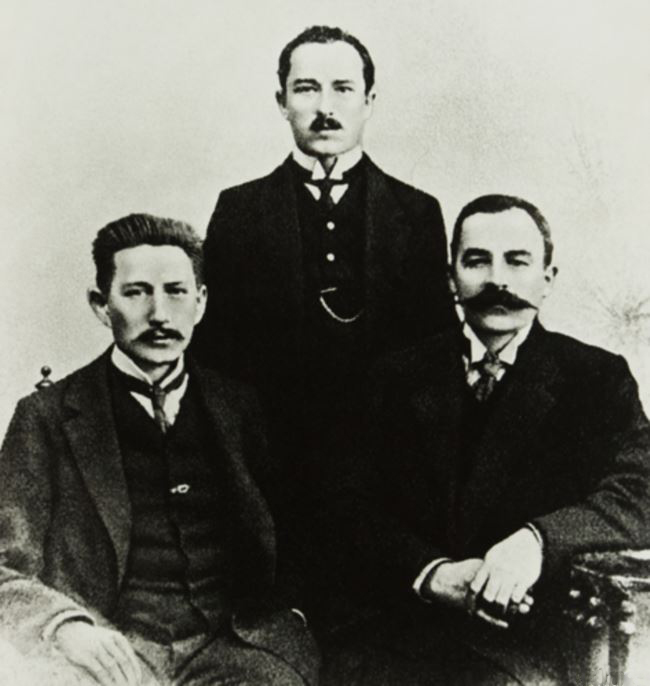 Браты Луцкевічы і Аляксандр Уласаў